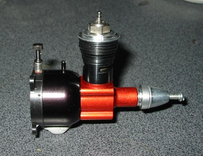 Cox Venom